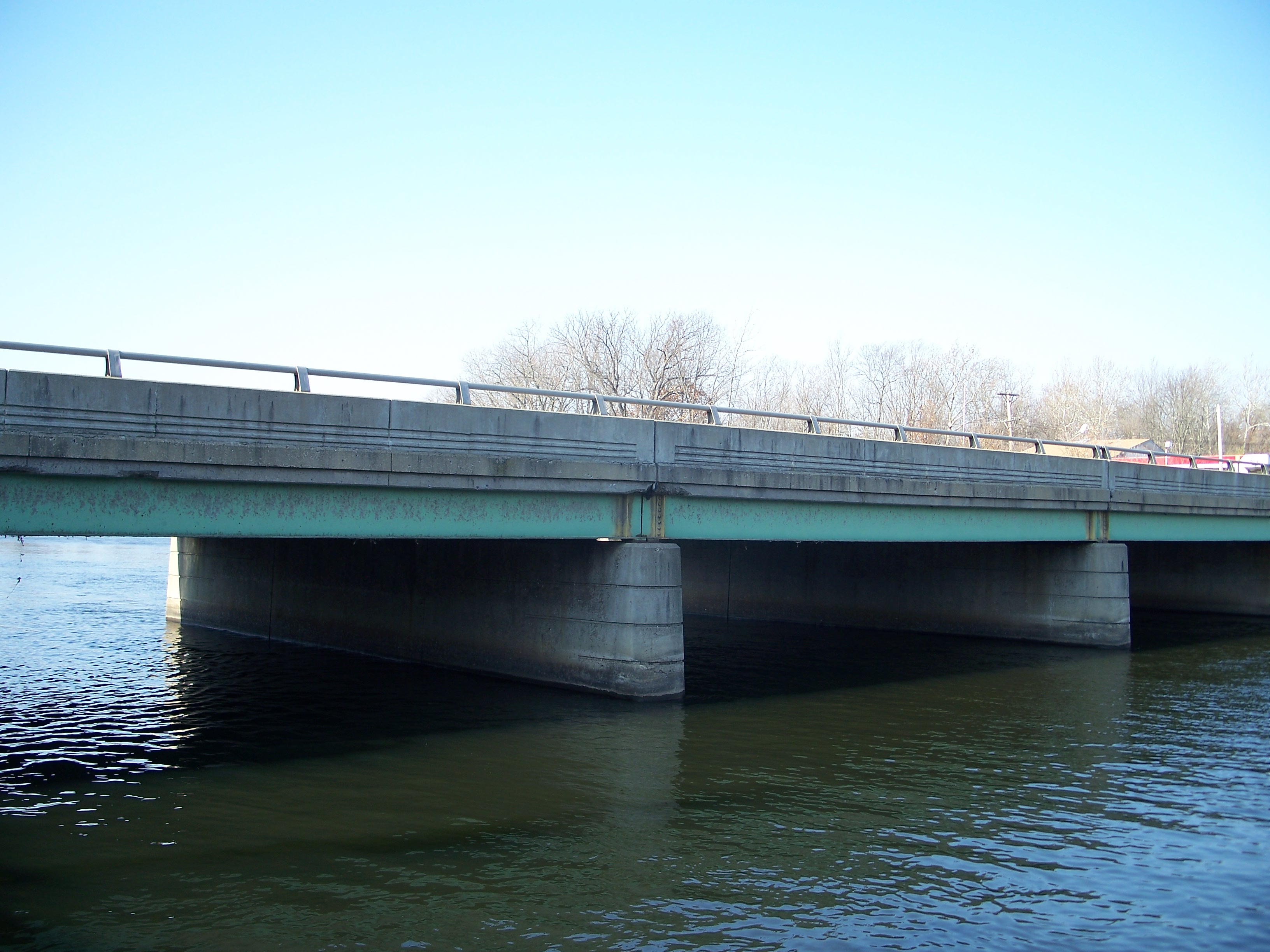 Constantine